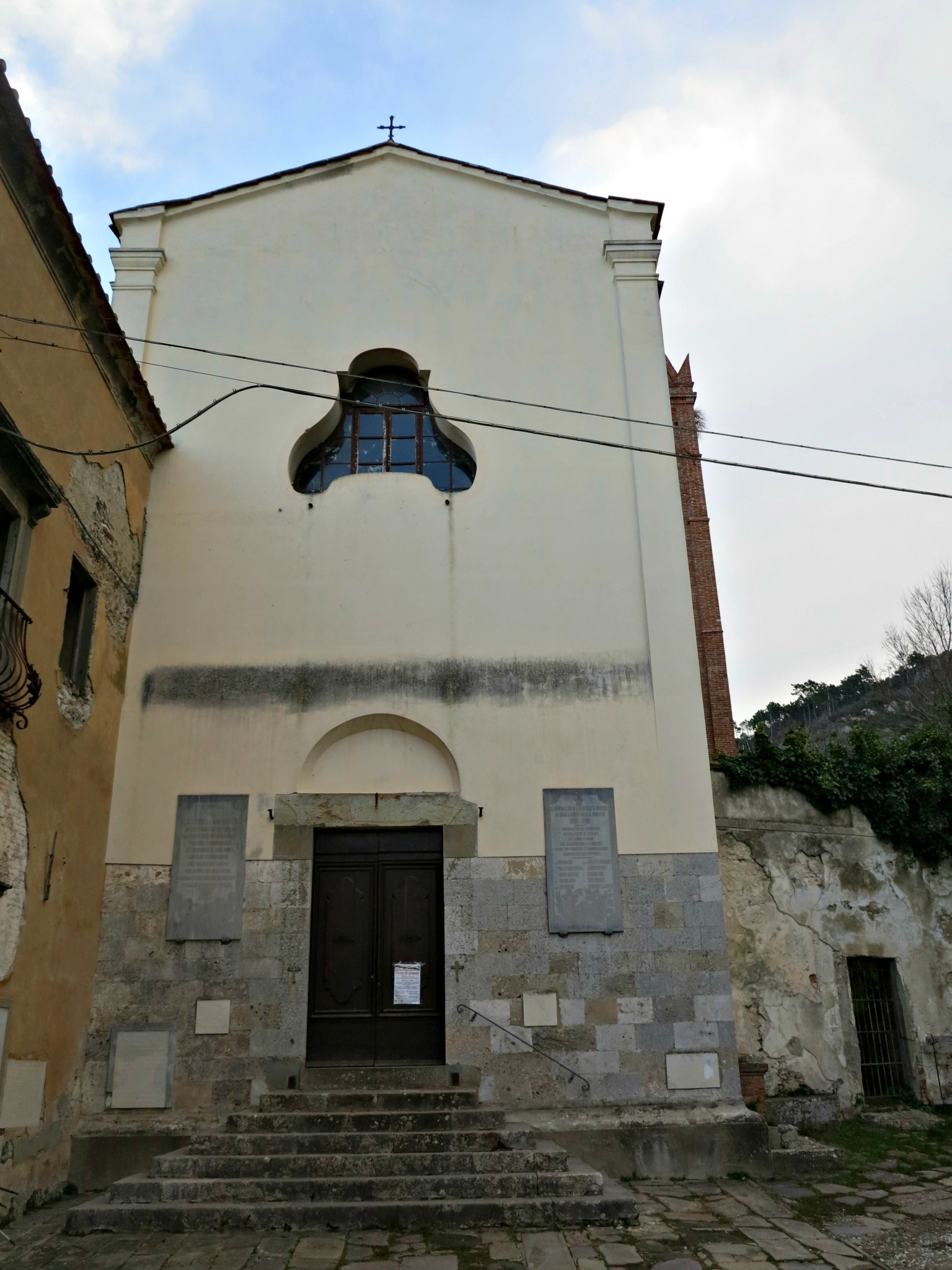 Chiesa di Sant’Agostino, Nicosia, Calci